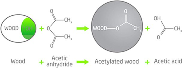 Accoya Formel